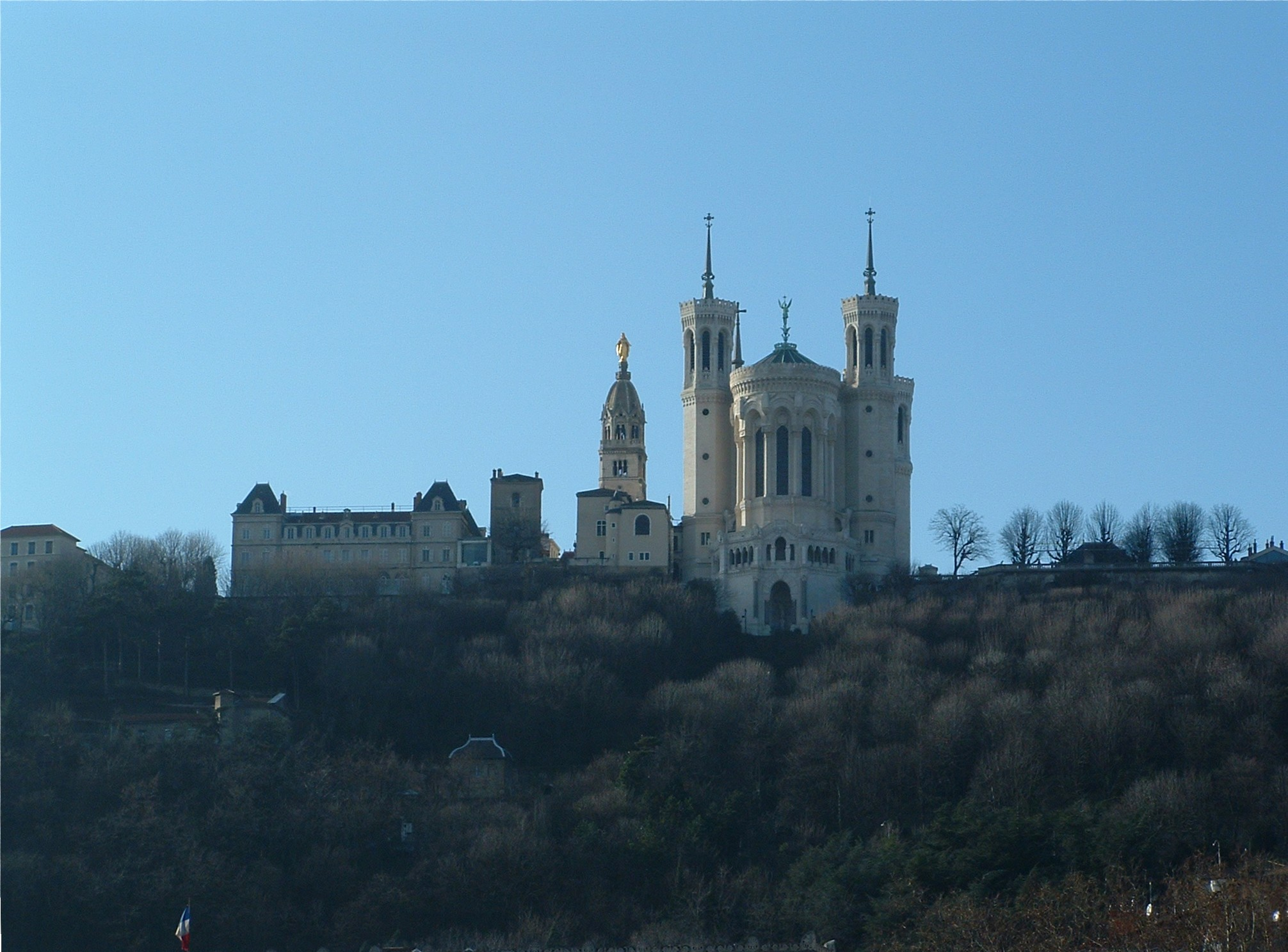 Fourviere vue de la Saône